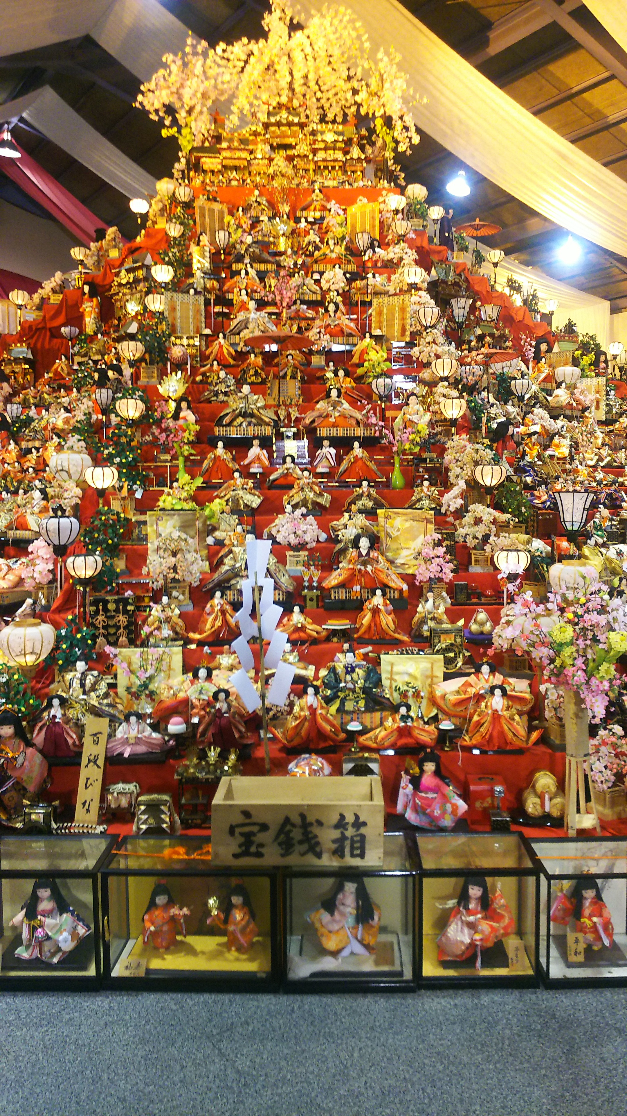 ビッグひな祭り 会場内の様子 2019年03月03日撮影 巨弾ひな壇の一角を縦型に撮影